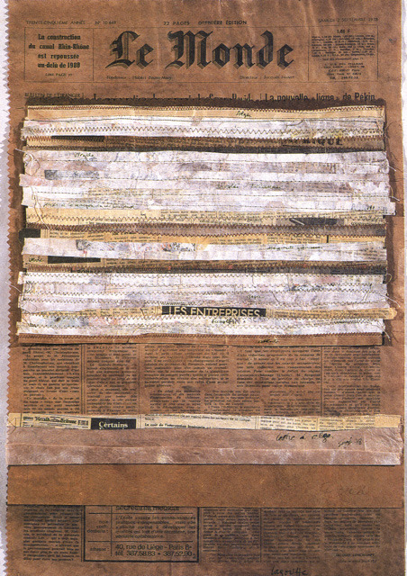 peinture